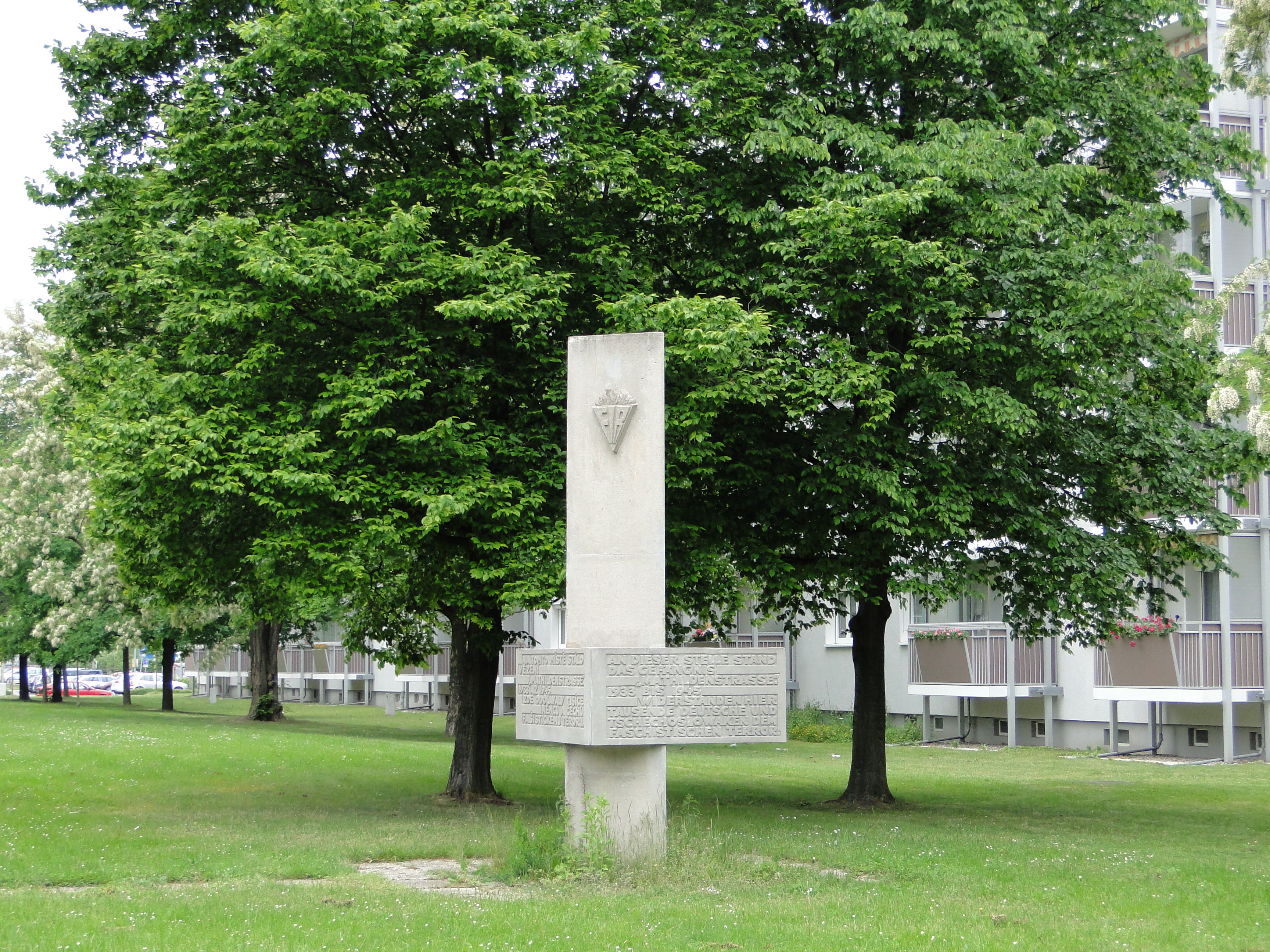 Denkmal Haftanstalt Mathildenstraße; 1975 von Johannes Peschel geschaffen